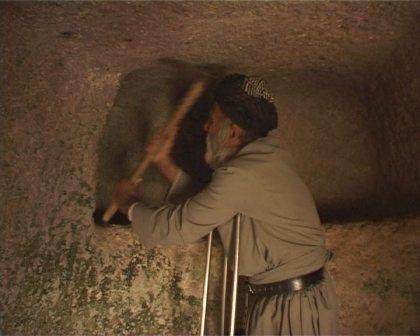 خالو حسین کوهکن و کلنگ مشهورش در حال کندن بخشی از غار سنگی خود (قسمت نزدیک قبر) (تصویری از سال‌های میانی دهه هشتاد شمسی).